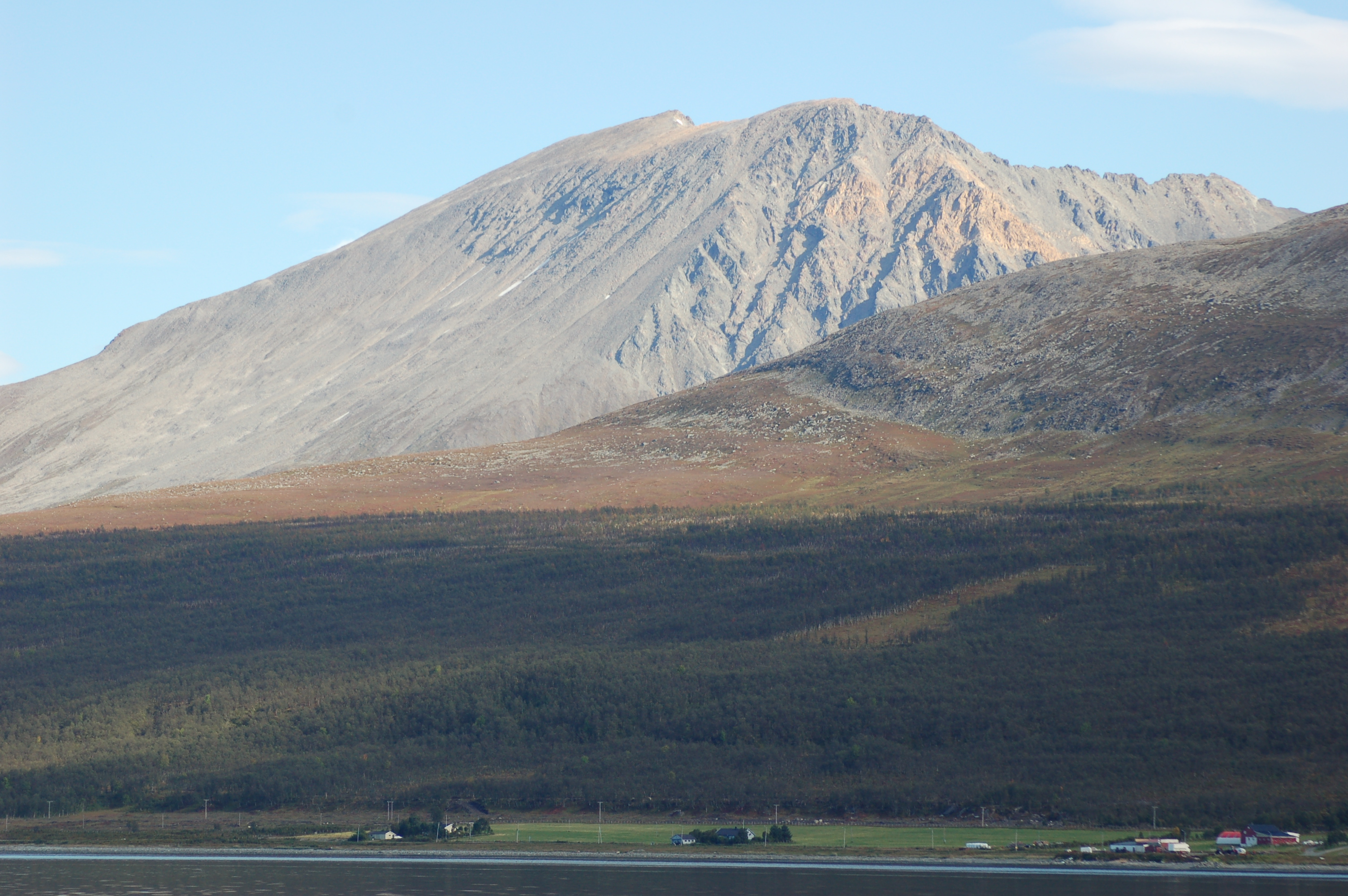 Storgalten sett fra Lenangsøyra